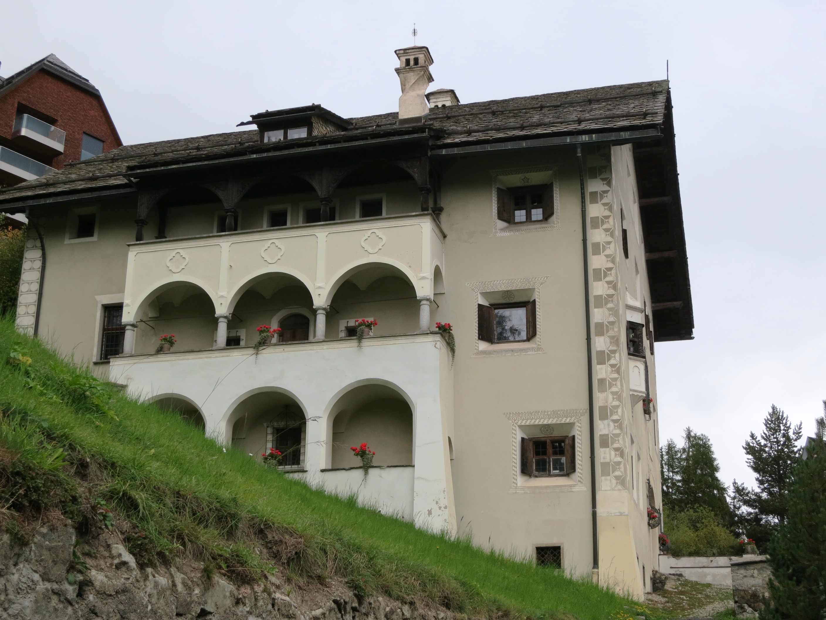 Engadinermuseum, St. Moritz GR, Schweiz